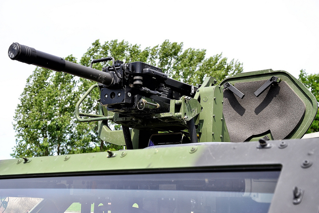 Granatmaschinenwaffe 40mm x 53 - Sanitätsregiment 22, Westfalenkaserne, Ahlen.